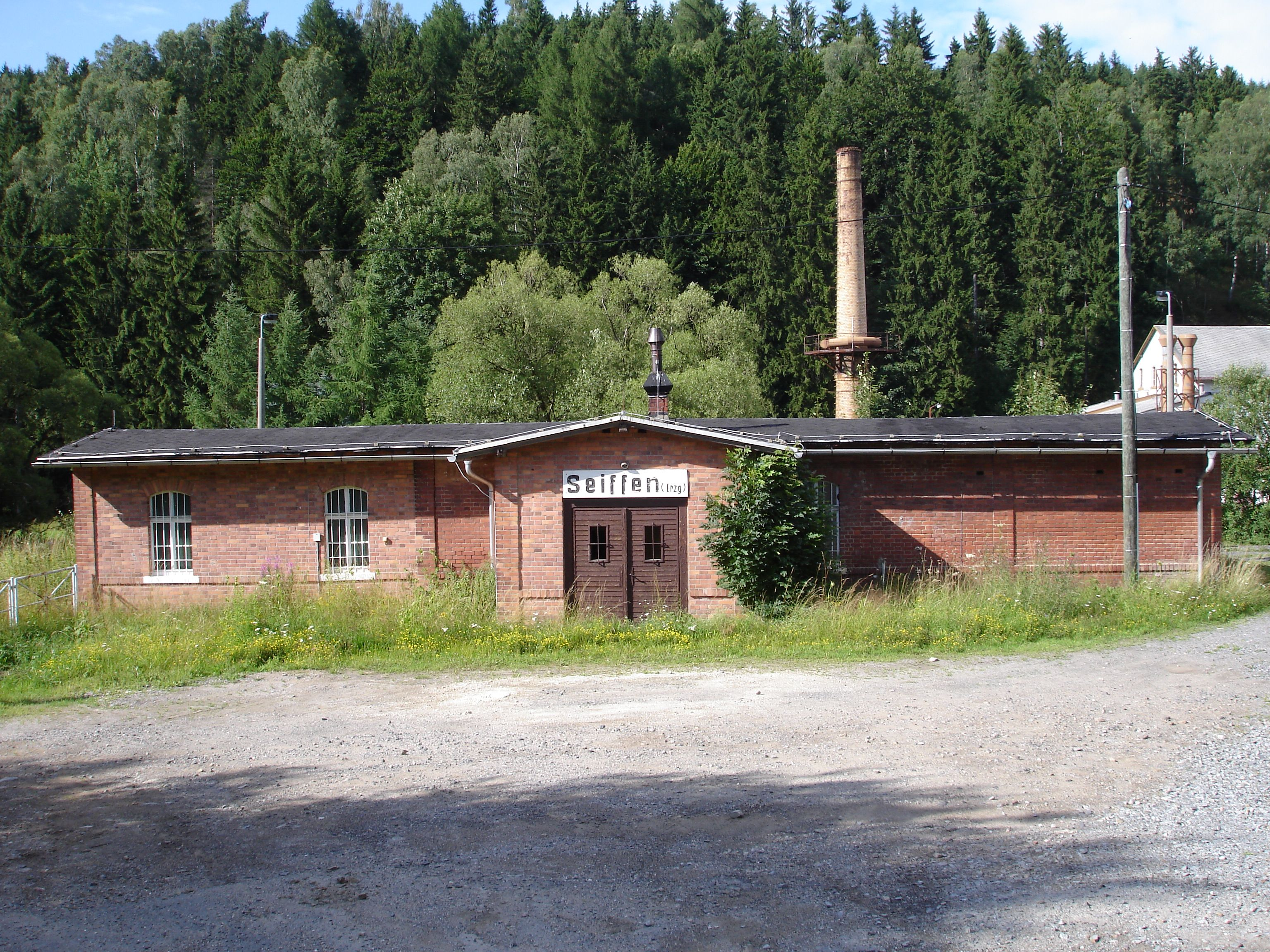 Haltepunkt Seiffen (Erzgeb), Bahnstrecke Pockau-Lengefeld–Neuhausen